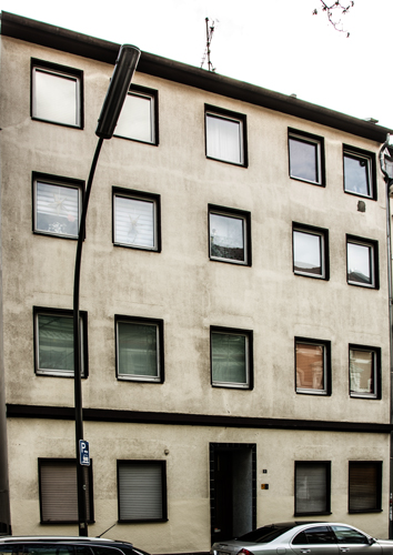 Stolpersteine Dortmund